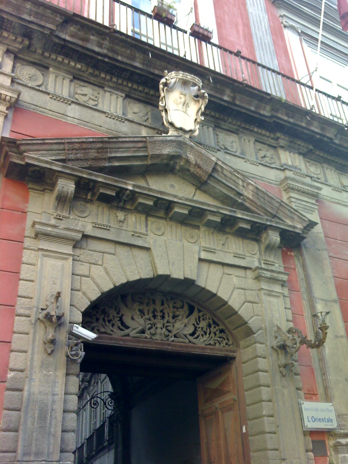 Palazzo Corigliano (Napoli). Particolare portone d'ingresso.